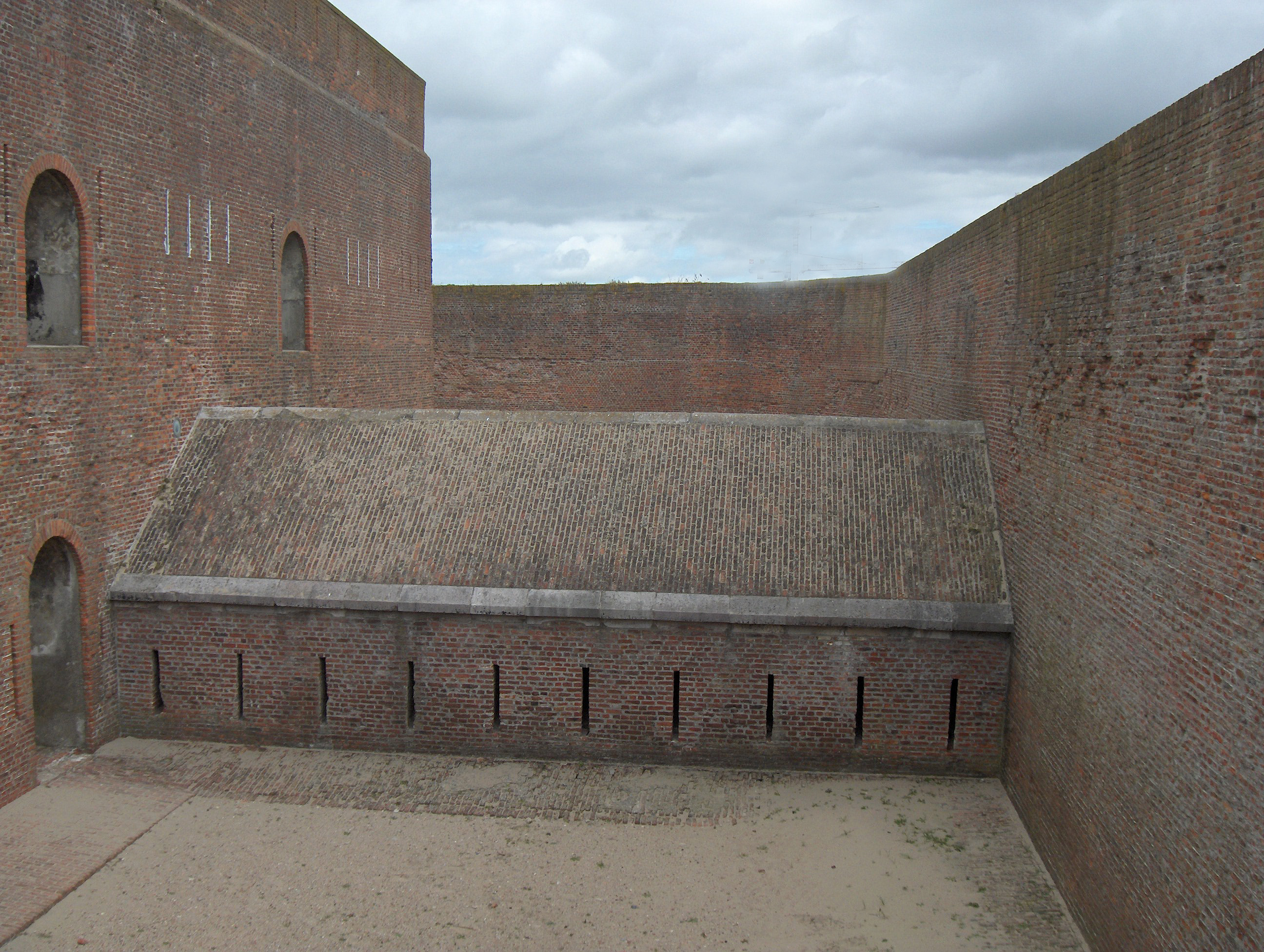 Caponnière, Fort Napoleon, Oostende, Belgium